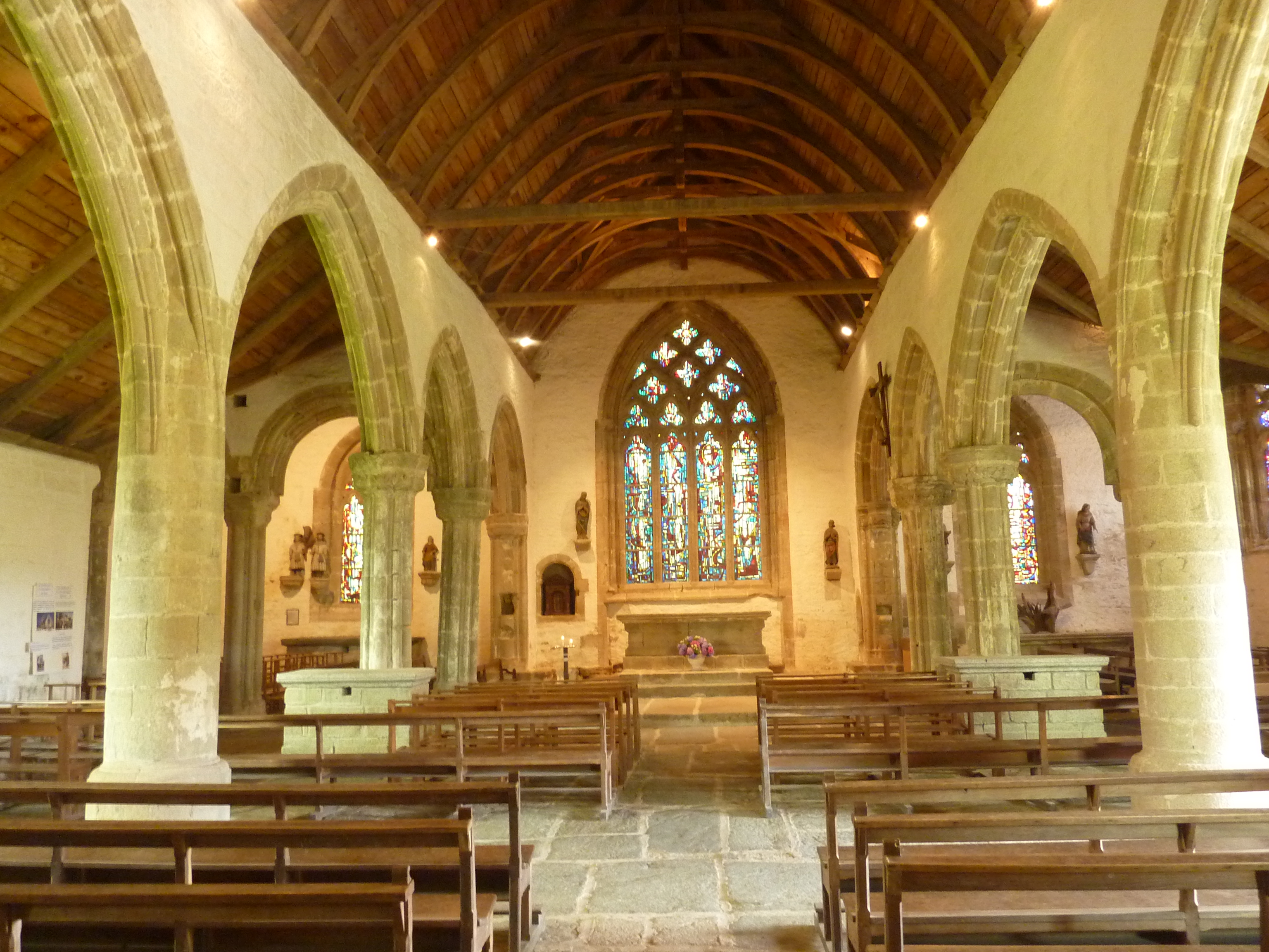 Plonéour-Lanvern : chapelle de Languivoa, vue intérieure d'ensemble.